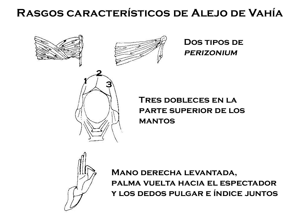 Características propias del escultor gótico Alejo de Vahía